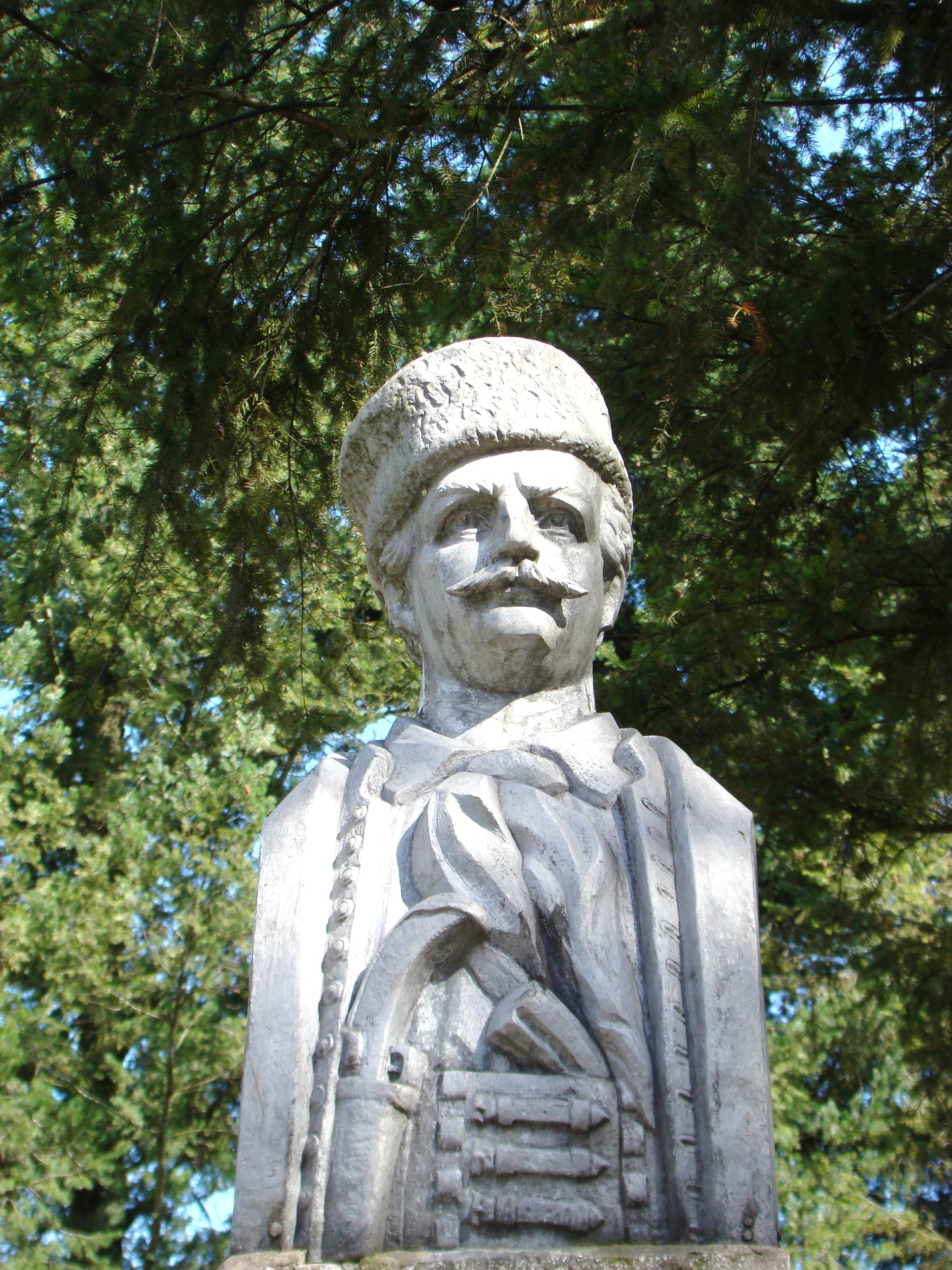 Monumentul lui Avram Iancu, sat HĂLMAGIU; comuna HĂLMAGIU